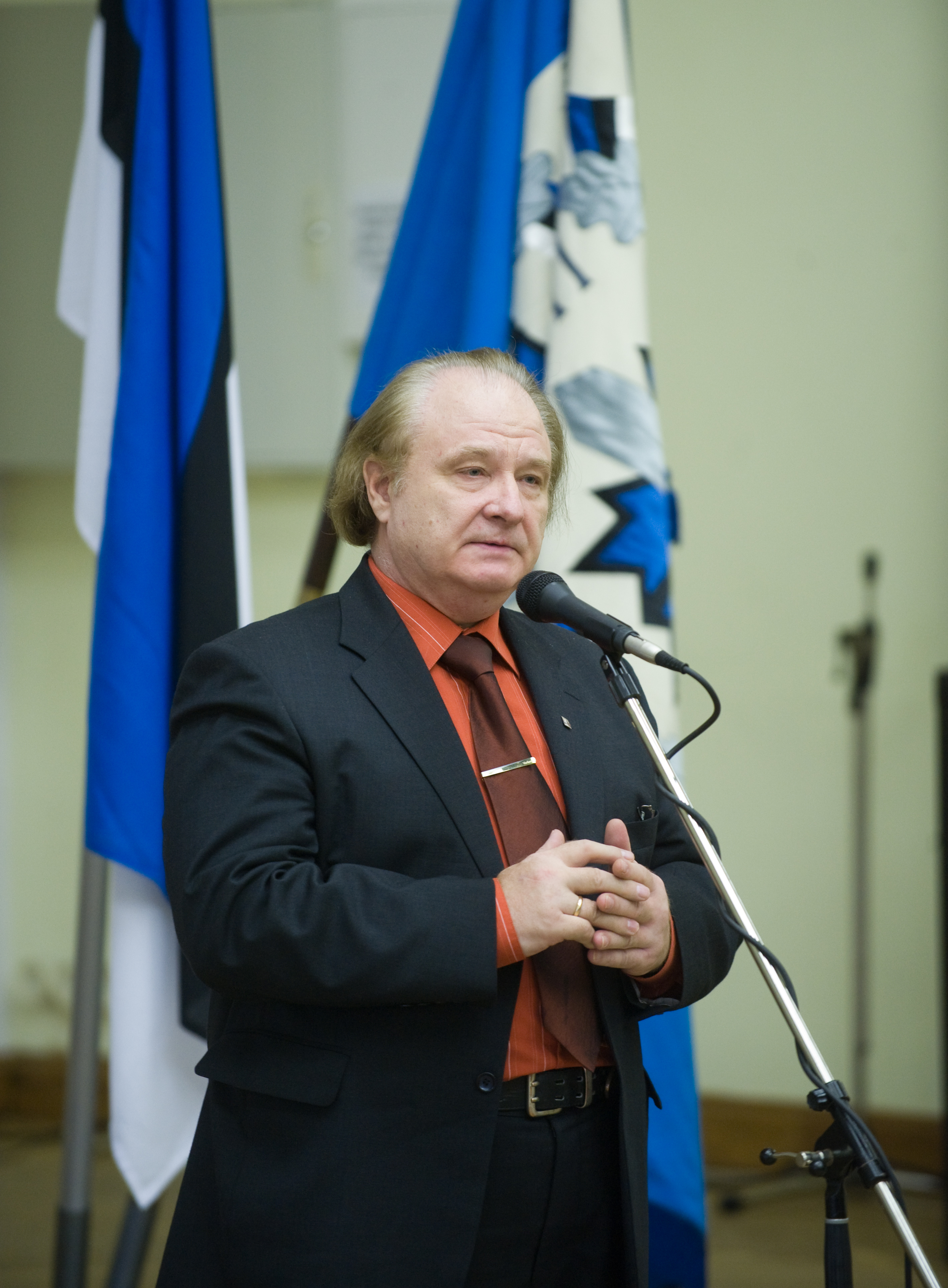 Aadu Jõgiaas